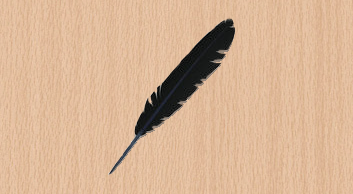 PLUMA NEGRA SOBRE FONDO BLANCO